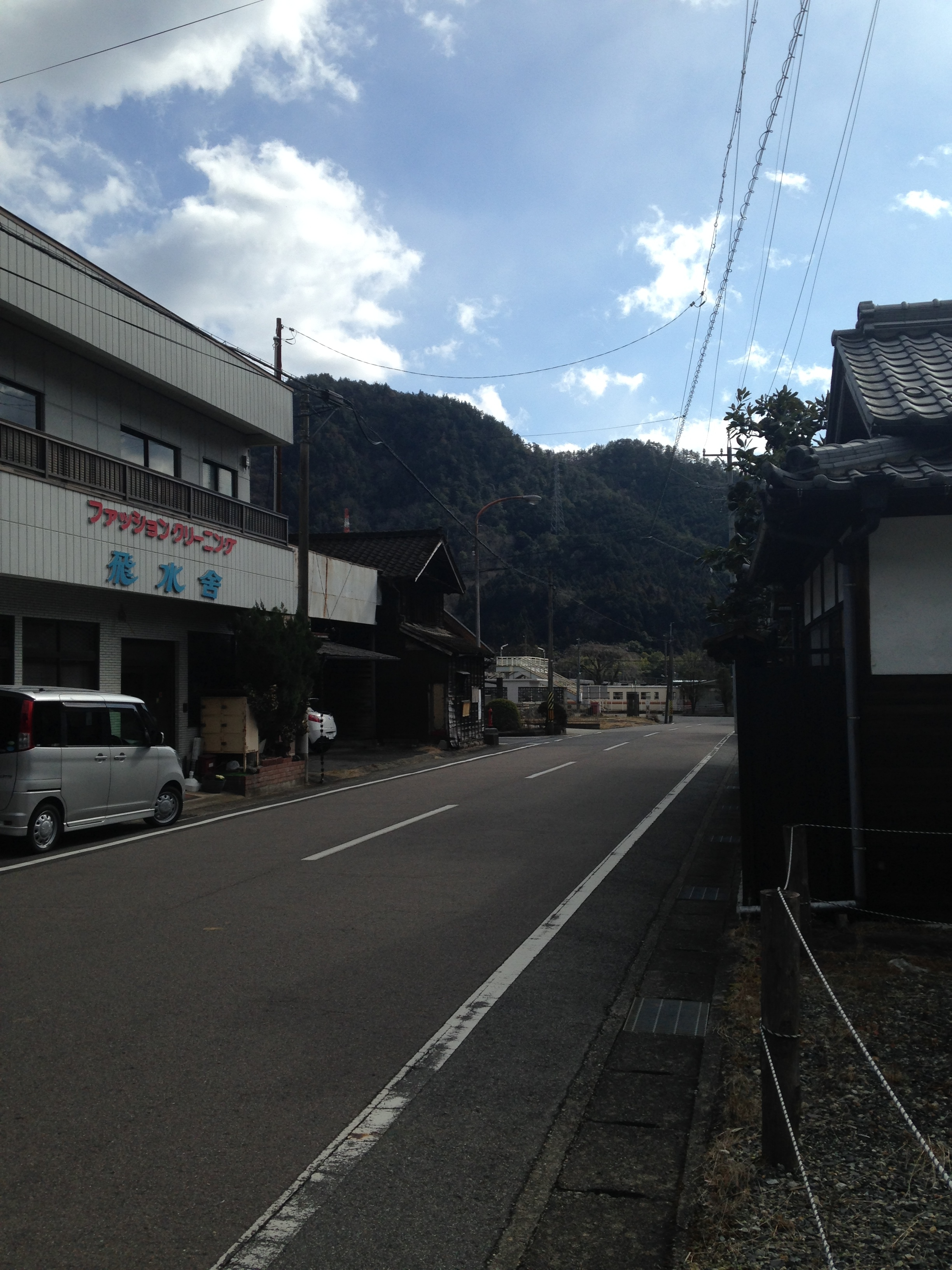 上麻生駅前の岐阜県道354号